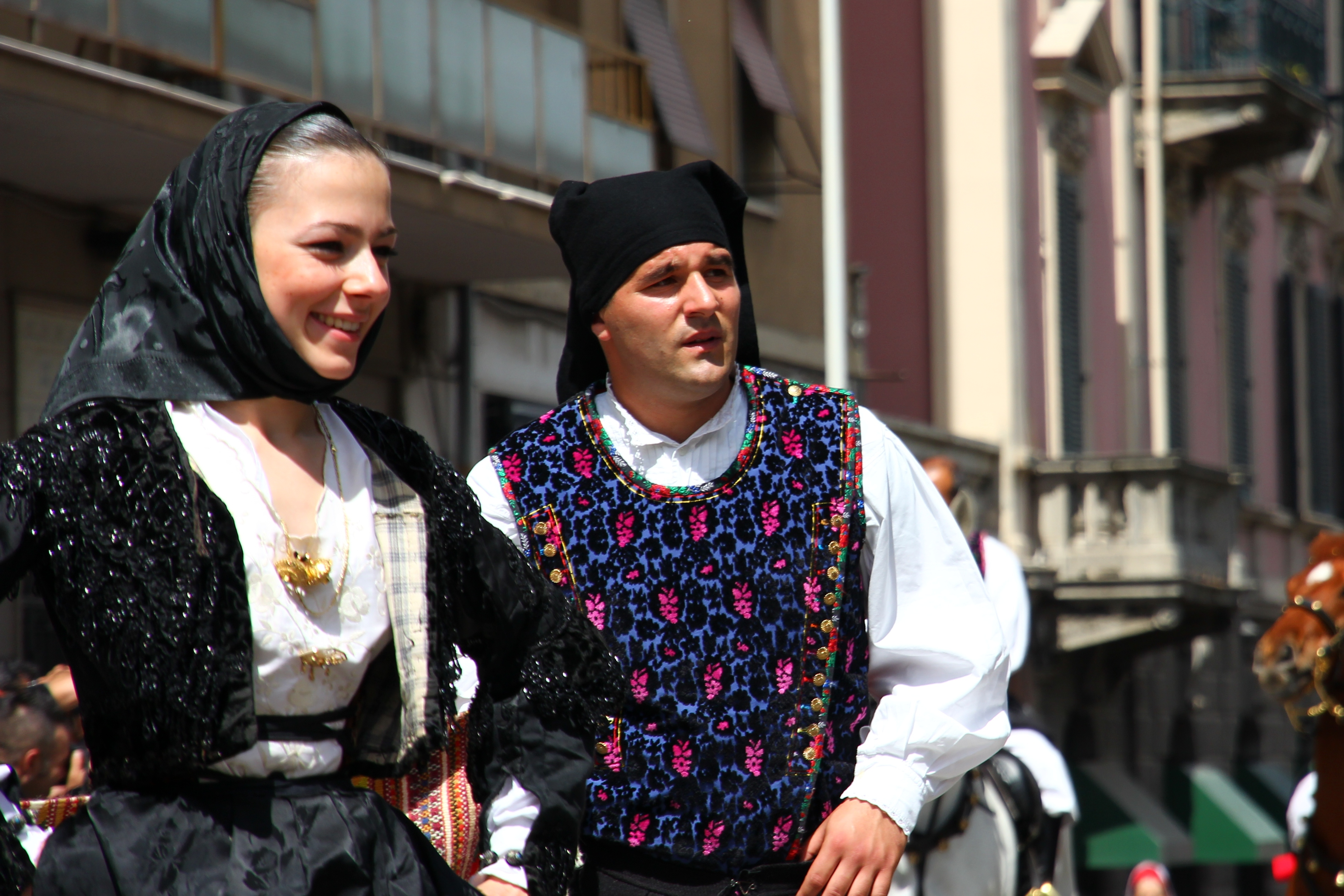 Cavalcata Sarda 2013 (Sassari)